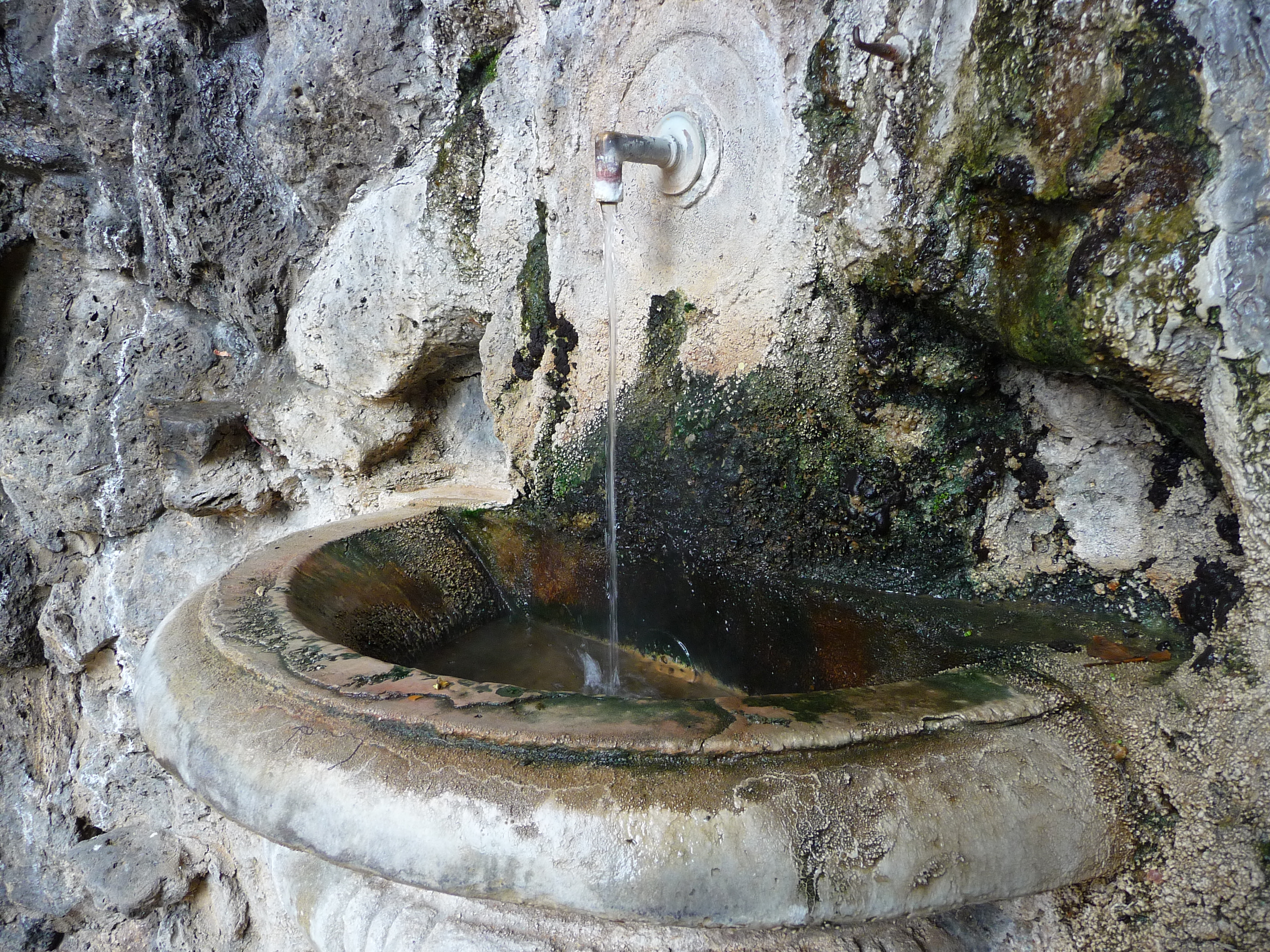 Dateilansicht der Fettquelle in Baden-Baden neben Friedrichstherme (173,2 m über NN, 62,5 Grad Celsius, 0,689 Liter pro Sekunde, Natrium-Chlorid Therme)